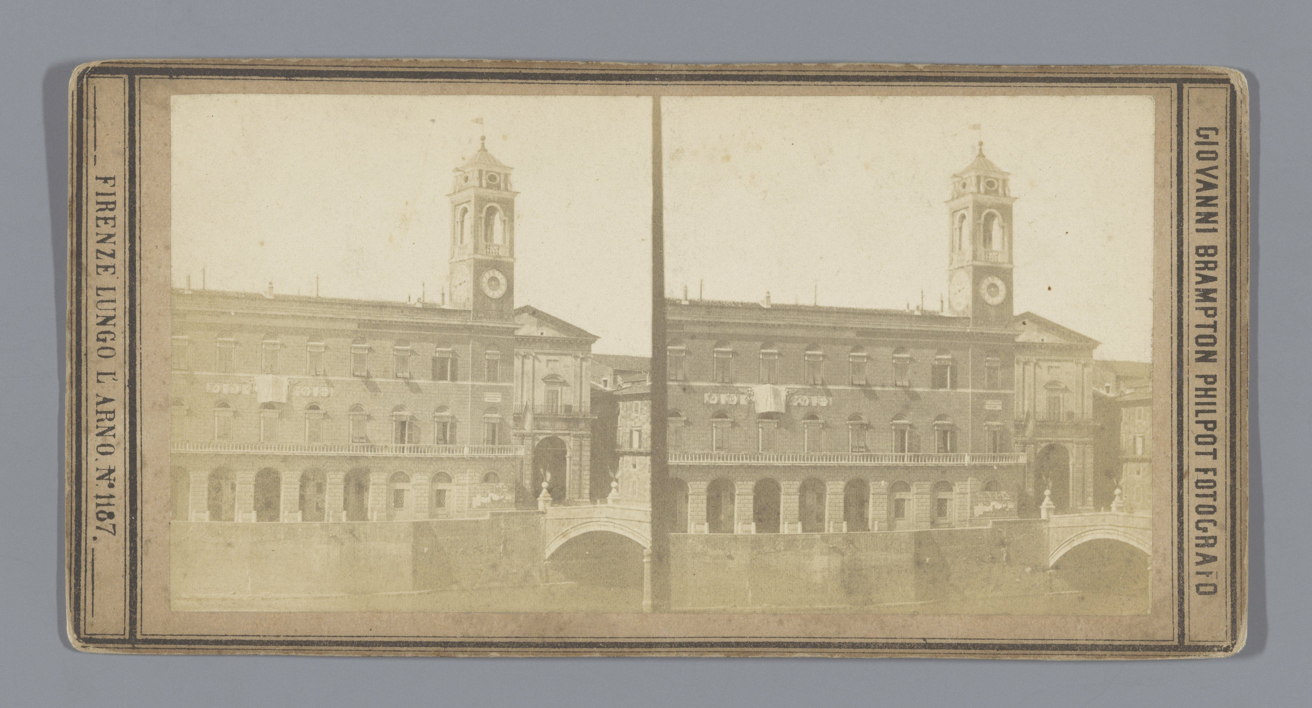 IdentificatieTitel(s): Gezicht op het Palazzo Pretorio te PisaObjecttype: stereofoto Objectnummer: RP-F-F07153Opschriften / Merken: naam, recto, gedrukt: ‘GIOVANNI BRAMPTON PHILPOT FOTOGRAFO FIRENZE LUNGO L'ARNO No. 1187.’opschrift, verso, handgeschreven: ‘Pisa Palazzo Communale’VervaardigingVervaardiger: fotograaf: Giovanni Brampton Philpot (vermeld op object)Plaats vervaardiging: PisaDatering: ca. 1850 - ca. 1870Fysieke kenmerken: albuminedrukMateriaal: karton fotopapier Techniek: albuminedrukAfmetingen: secundaire drager: h 85 mm × b 170 mmOnderwerpWat: façade (of house or building)tower, clock tower ~ monumental adornmentWaar: Palazzo PretorioVerwerving en rechtenVerwerving: overdracht van beheer 1994Copyright: Publiek domein